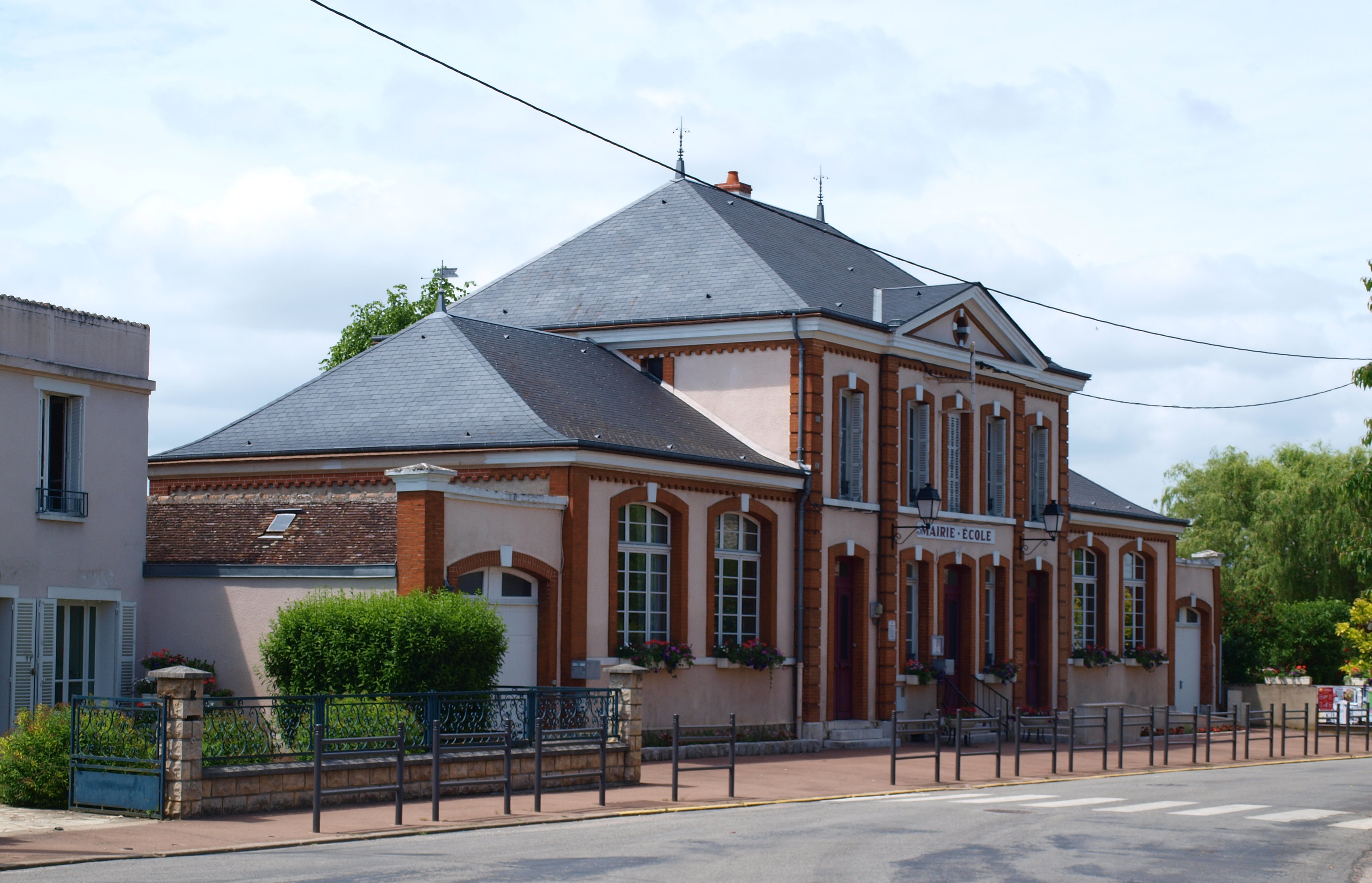 Girolles (Loiret, France)